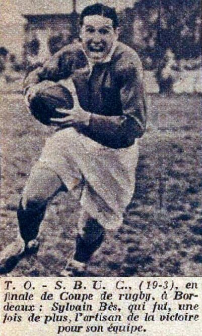 Sylvain Bès, vainqueur de la Coupe de France de rugby à XV avec le Toulouse Olympique Employés Club, en mai 1944.